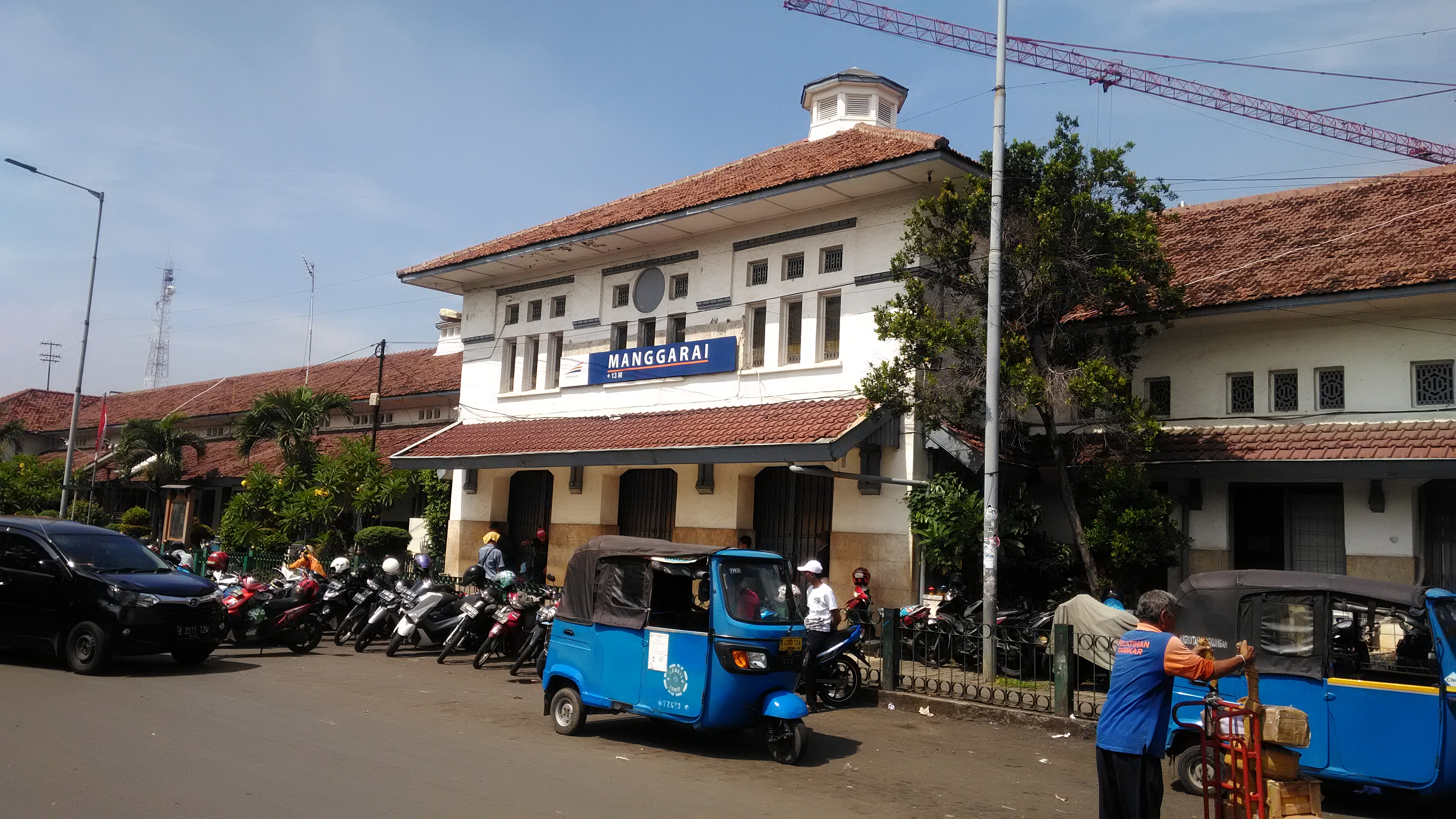 Stasiun Manggarai dengan Papan Nama Terbaru versi 2017 Basa Sunda: Stasion Manggarai nu tos dipasang Papan Ngaran Anyar versi 2017